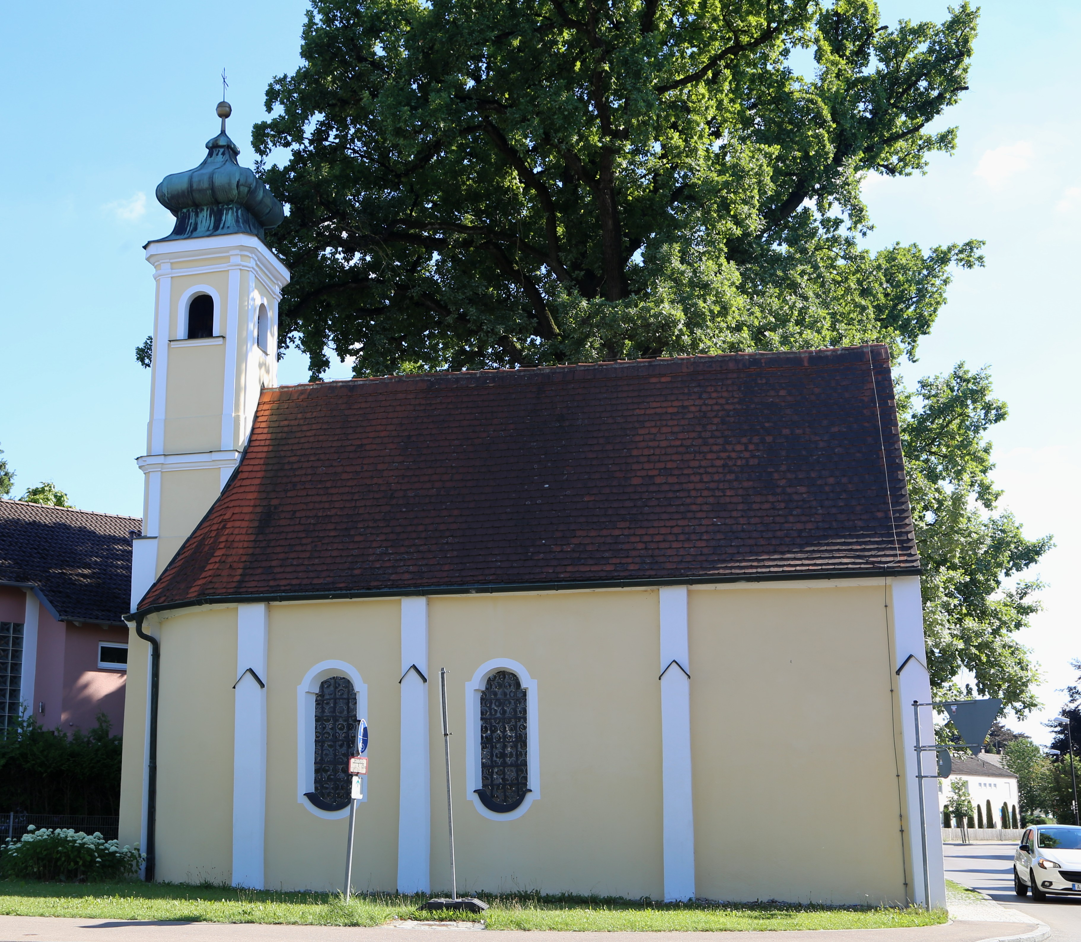 Donauwörther Straße 23, Aichach; Katholische Kapelle St. Sebastian, einschiffiger Bau unter Stichkappentonne, im Kern spätgotisch, 1656, erweitert 1794; mit Ausstattung